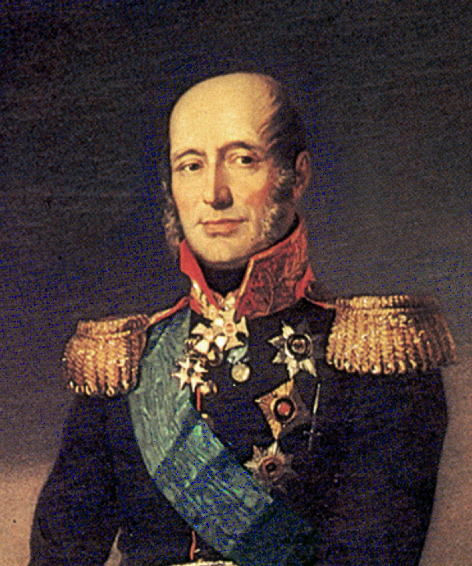 фрагмент портрета генерал–фельдмаршала князя М. Б. Барклая де Толли для Военной галереи Зимнего дворца. Художник Дж. Доу (1829)